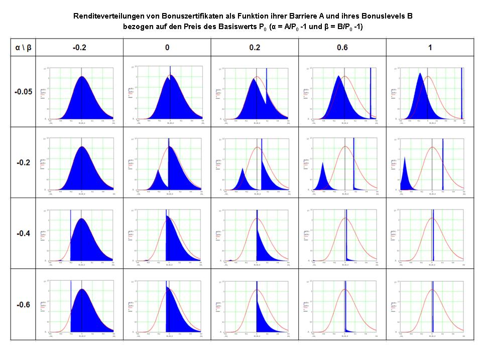 Renditeverteilungen von Bonuszertifikaten (Laufzeit 1 Jahr) als Funktion der absorbierenden Barriere A und des Bonuslevels B basierend auf einem fiktiven Basiswert mit Startwert P0